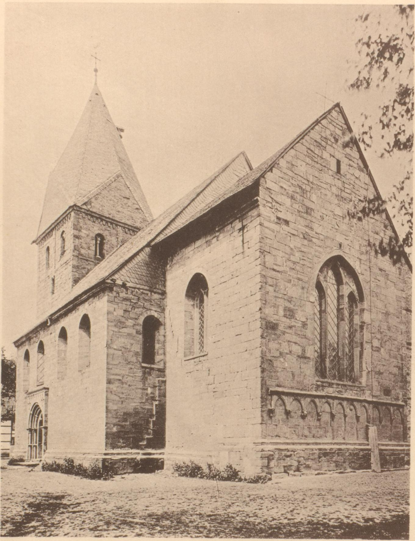 Die Johann Baptistkirche in Dortmund Brechten von der Süd-Ostseite um 1890